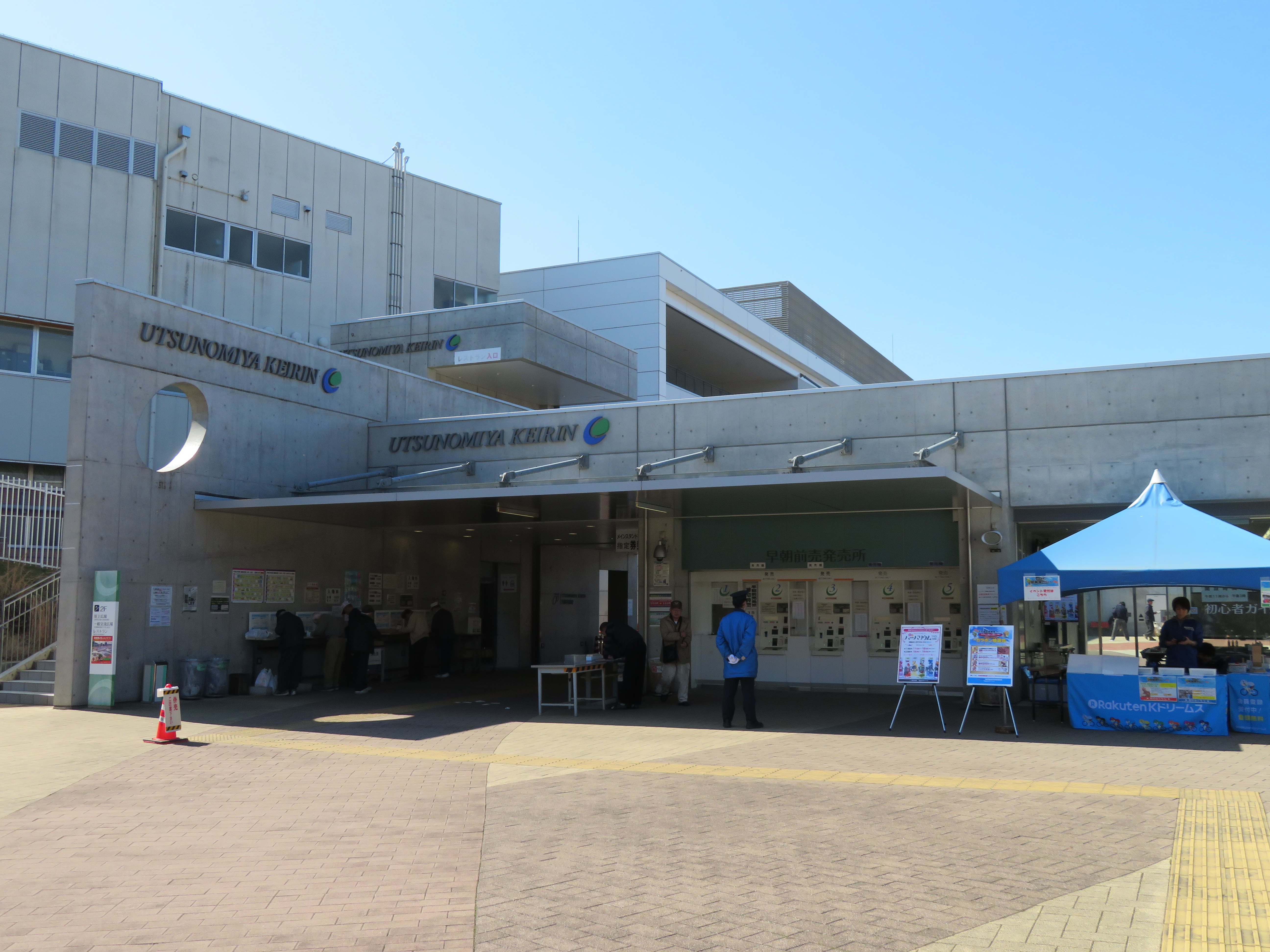 宇都宮競輪場